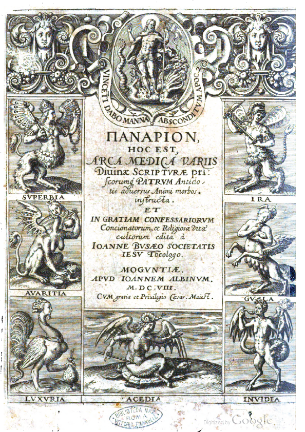 Busaeus, Johannes. Panarion, hoc est, Arca medica variis diuinae scripturae, priscorumque Patrum antidotis, aduersus animi morbos instructa et in gratiam confessariorum concionatorum, et religiosae vita cultorum. 1608.